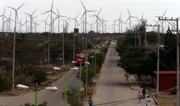 Calle principal La Venta, Juchitán, Oaxaca, México